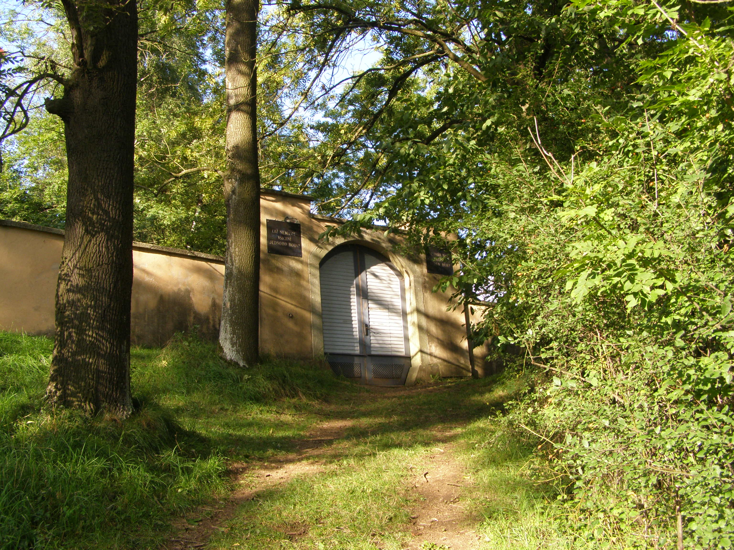 Telč, Staré Město, židovský hřbitov, vstupní brána